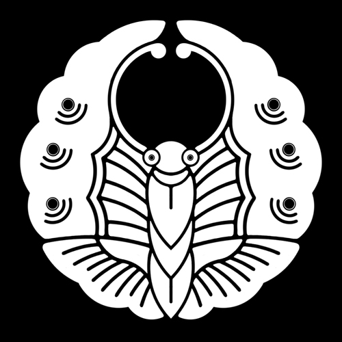 「浮線蝶」紋（染抜）